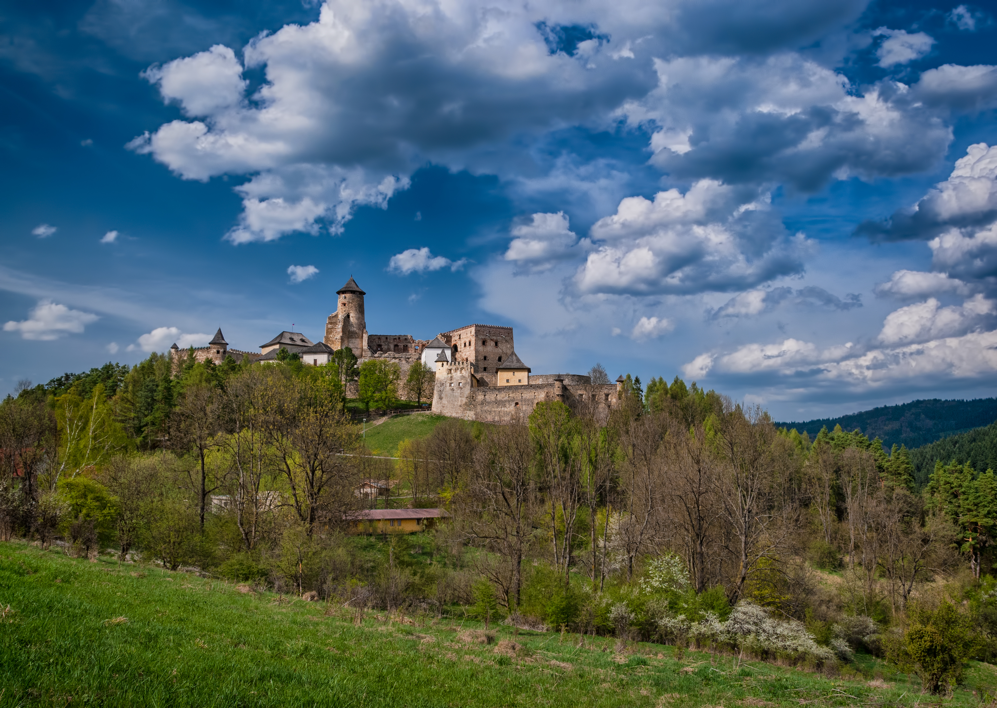 Hrad